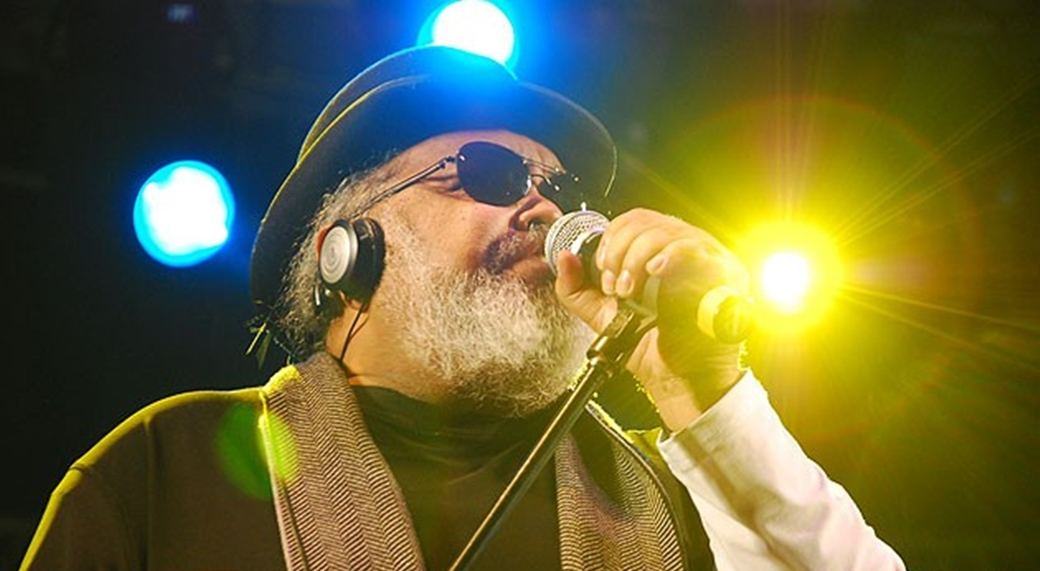 Jorge Aragão da Cruz (Rio de Janeiro, 1 de Março de 1949) é um cantor, sambista, compositor brasileiro.